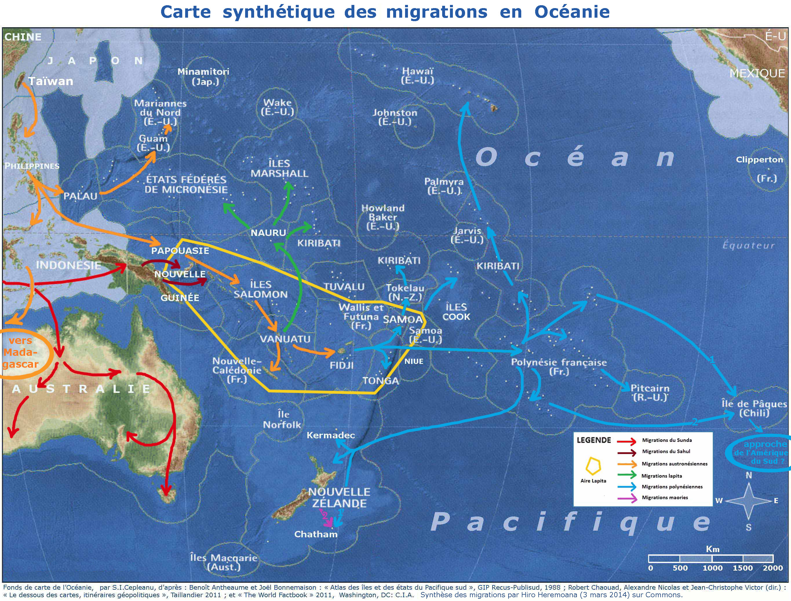 Synthèse des mouvements migratoires antiques en Océanie (fond de carte : Fond de carte Oceania2011 [libre de droit pour tout usage non commercial])